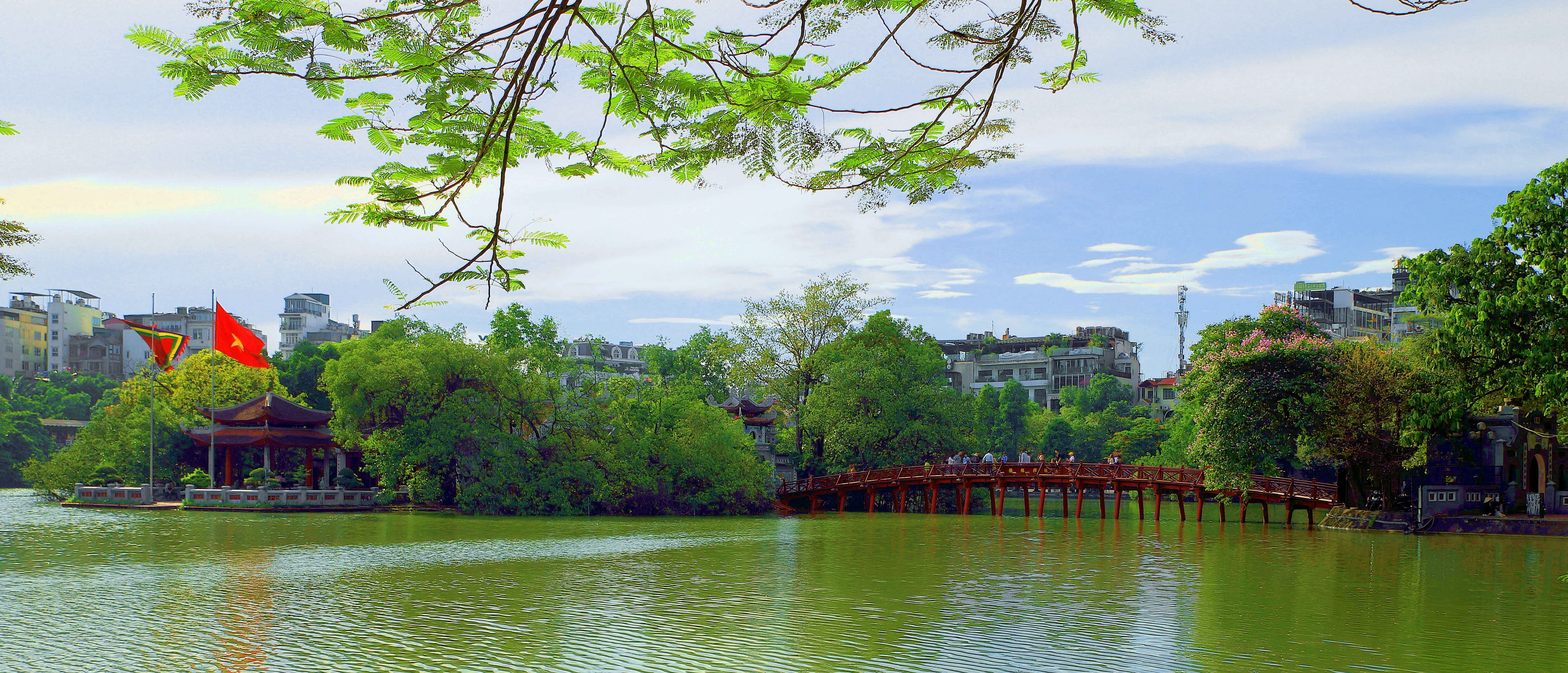 Toàn cảnh nhìn từ bên ngoài